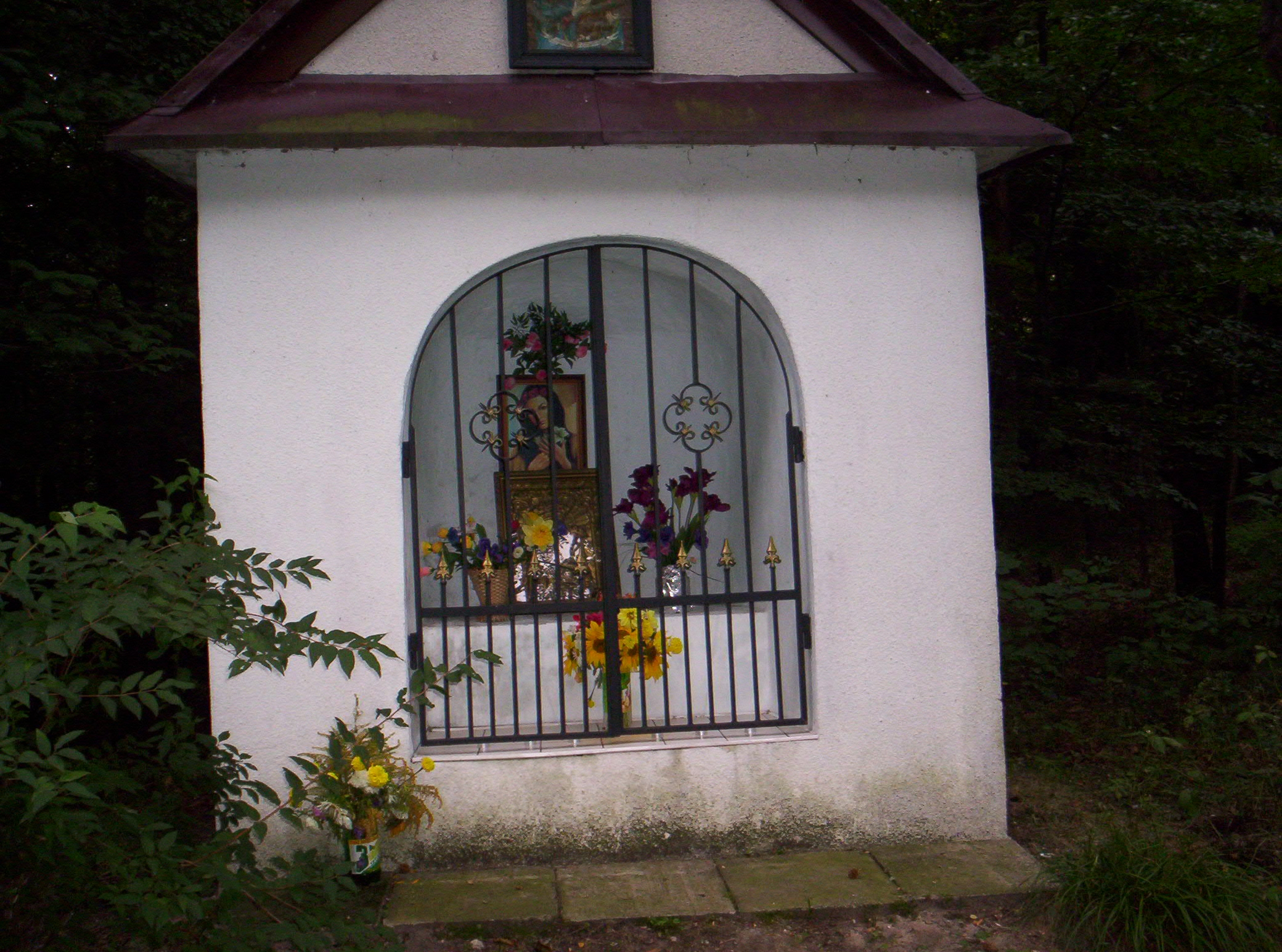 Kapliczka św. Rozalii